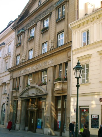 Knihovna města Plzně - hlavní budova